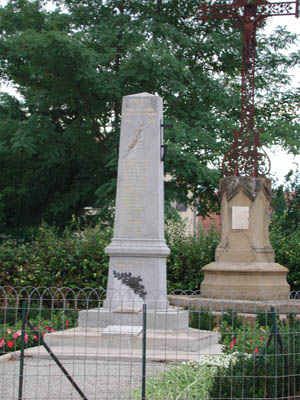 Le monument aux morts de la guerre de 1914-1918 de Malissard (Drôme) en 2004, avant son transfert derrière la mairie du village